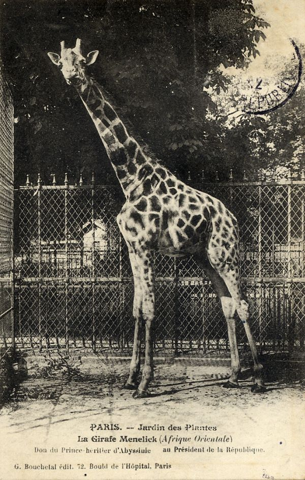 La girafe Ménélik, mâle de 7 ans arrivé le 2 Janvier 1911 suite à un don du prince héritier d’Abyssinie Ménélik II au Président de la République Française, Armand Fallières.